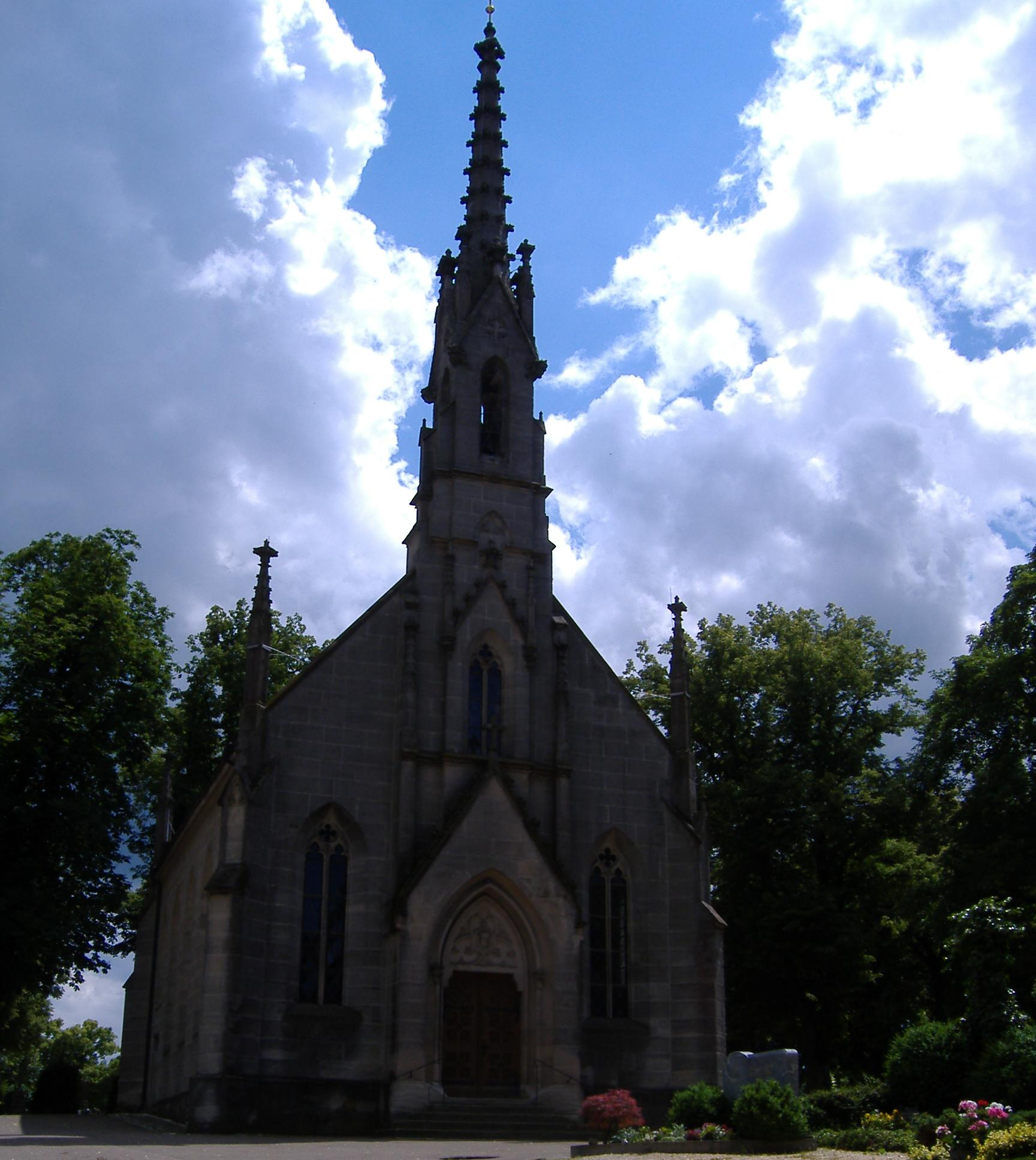 Friedhofskirche St. Emmeran Nördlingen